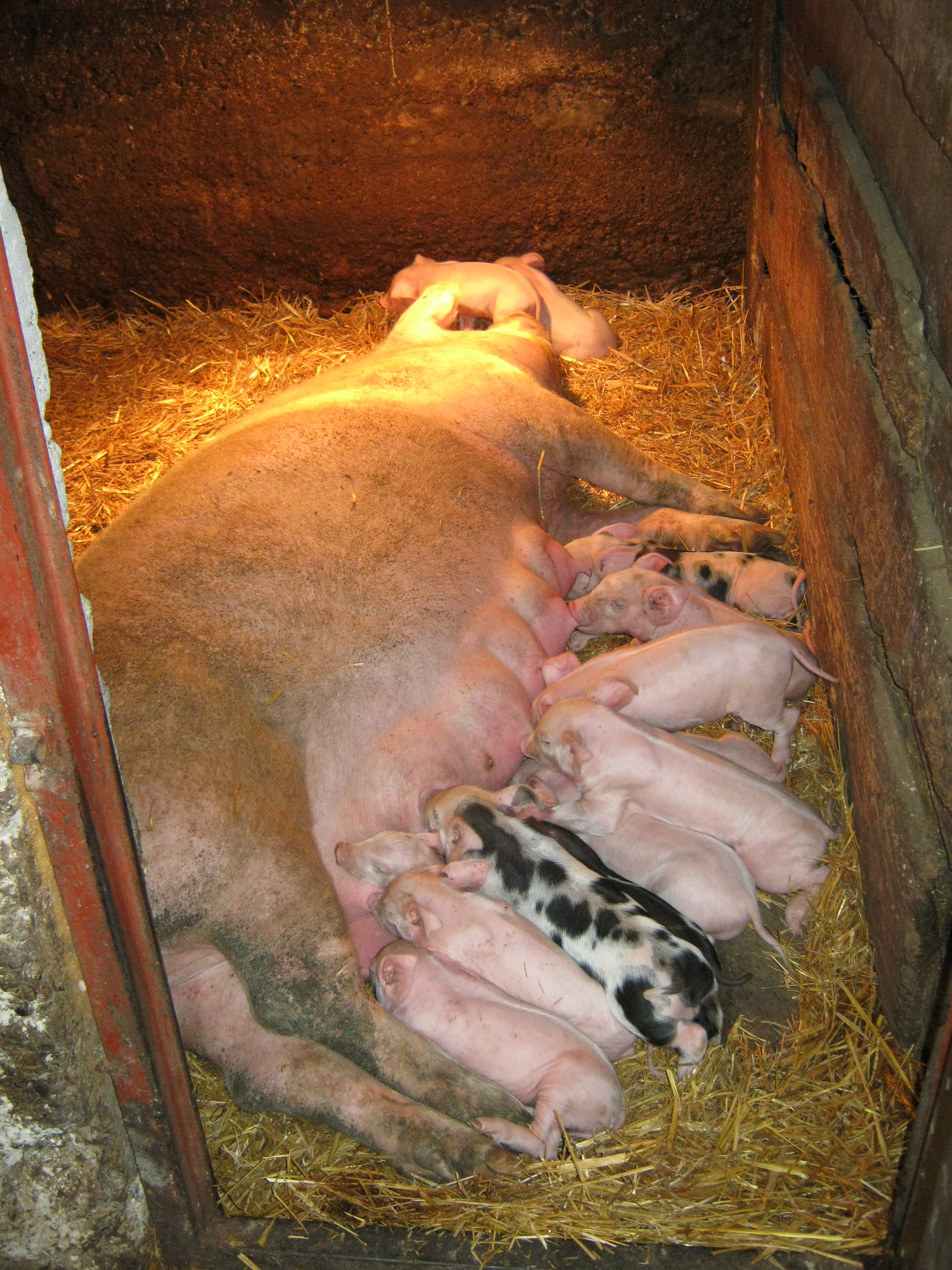 Krmača doji prasiće u Šaranima kod Gornjeg Milanovca.